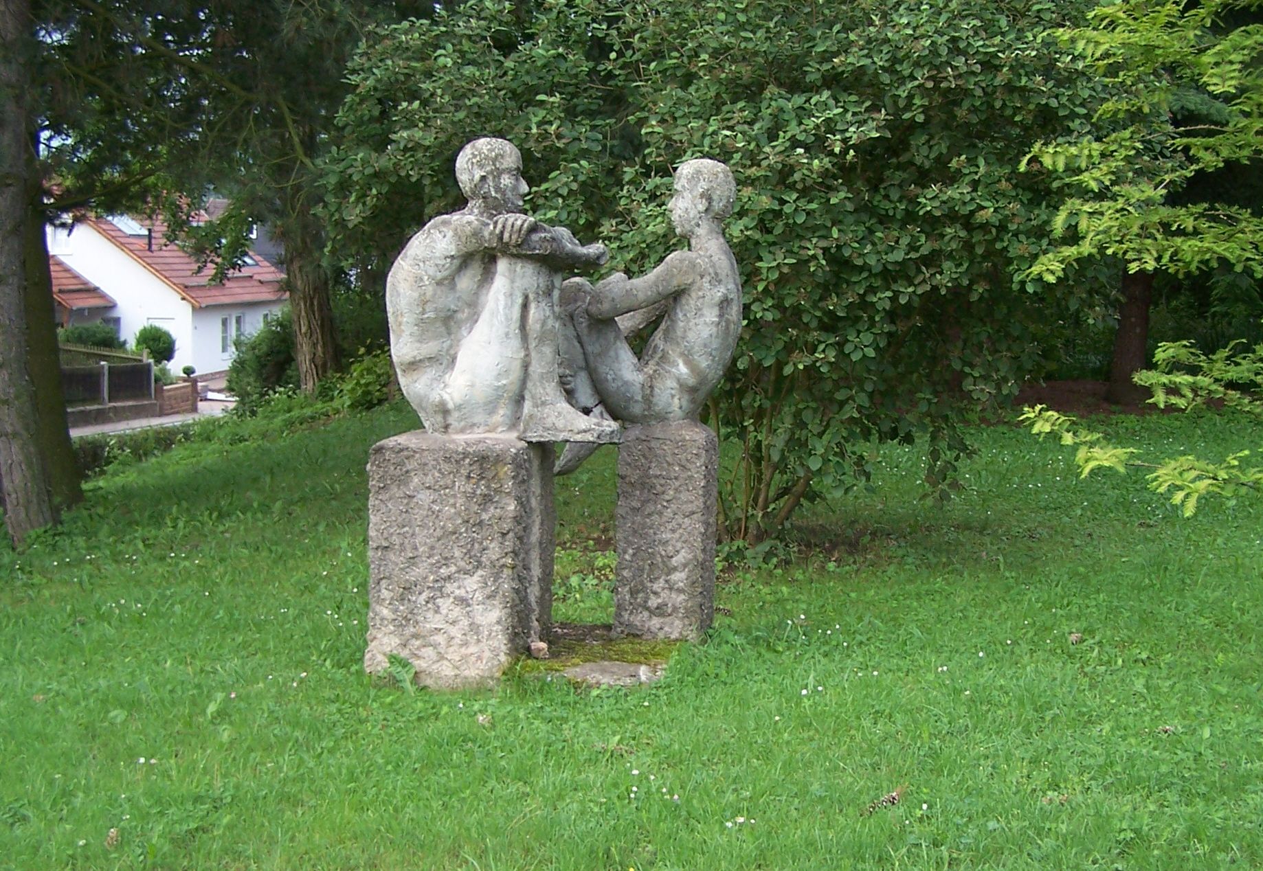 Skulpturengruppe am Eingang der Mechterstädter Schule.